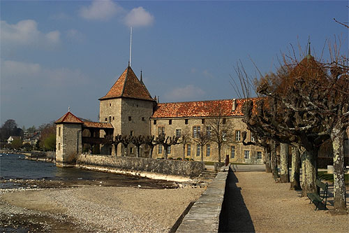 Schloss in Rolle (VD)